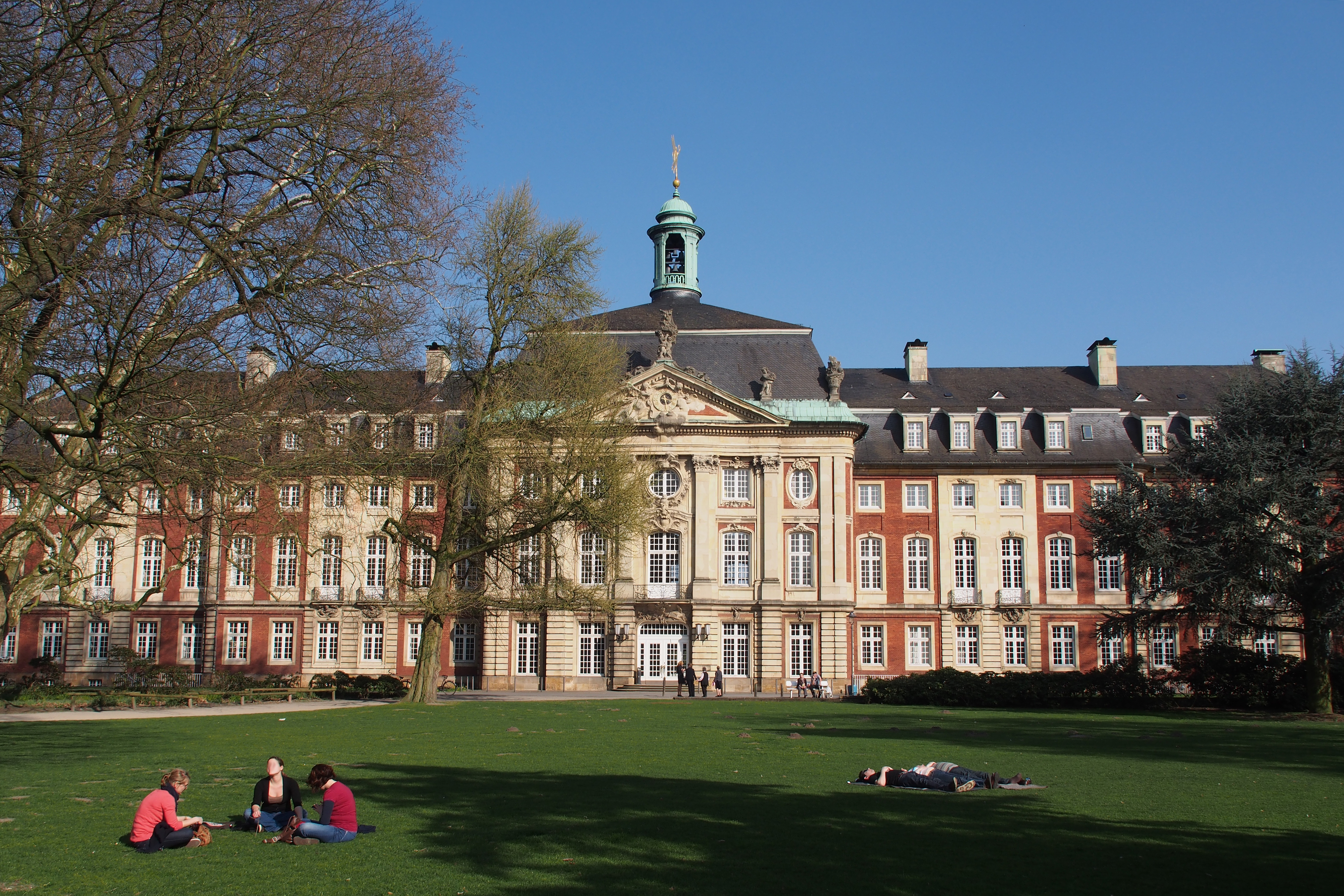 Westseite des Fürstbischöfliches Schlosses Münster (Westfalen)